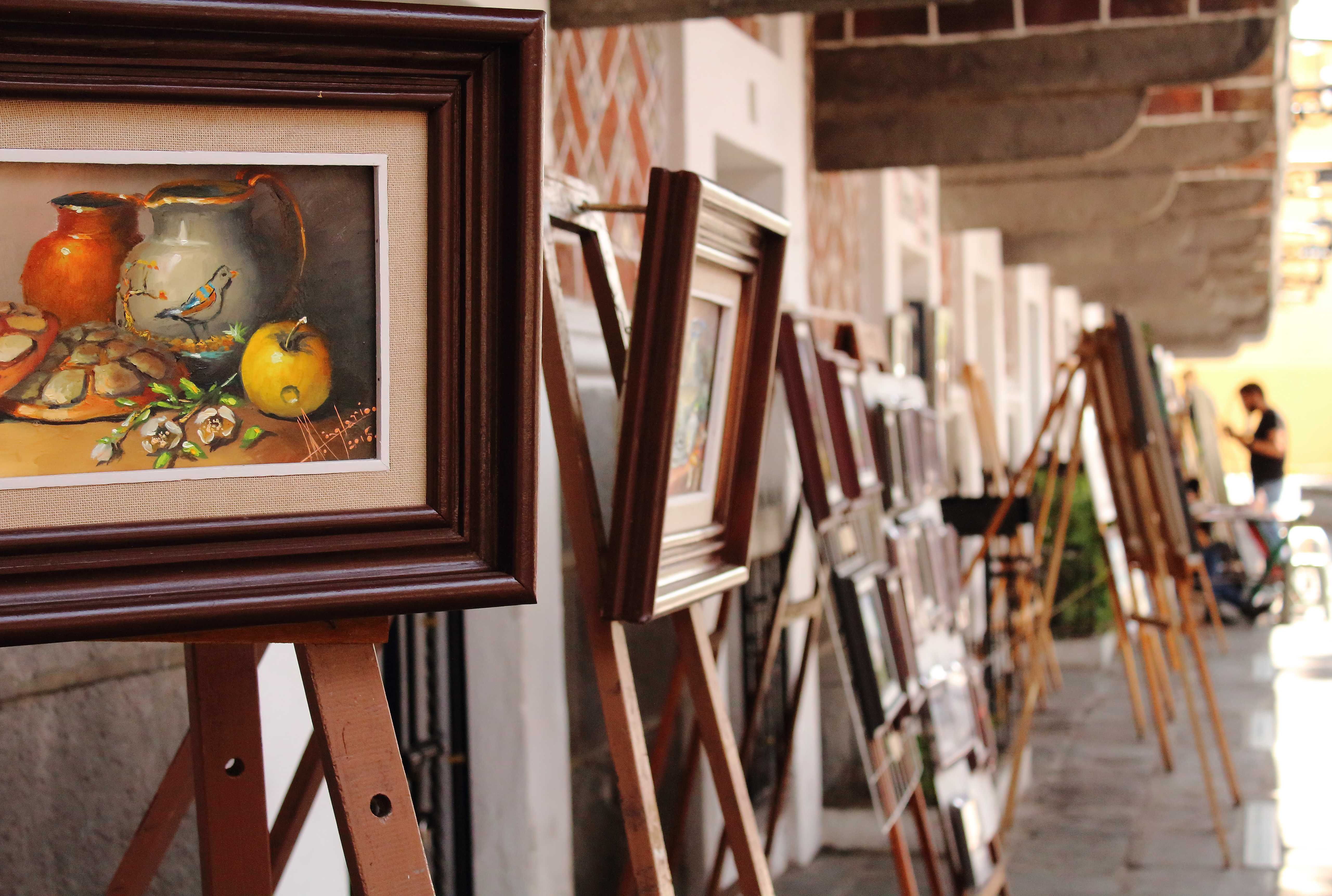 Barrio del artista en el estado de Puebla, México.